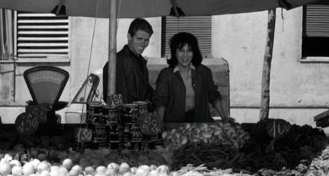 Screenshot from Mamma Roma directed by Pier Paolo Pasolini